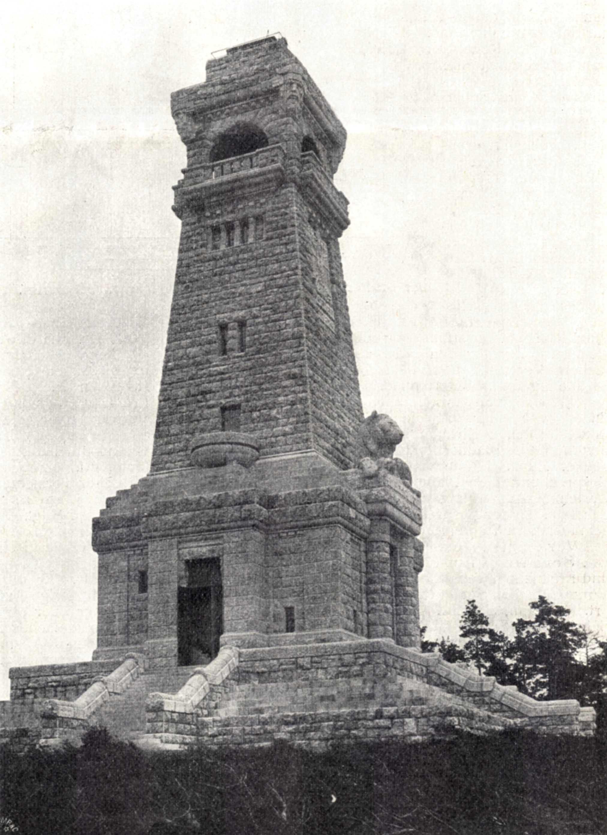 Bismarck-Warte auf den Müggelbergen bei Berlin-Köpenick